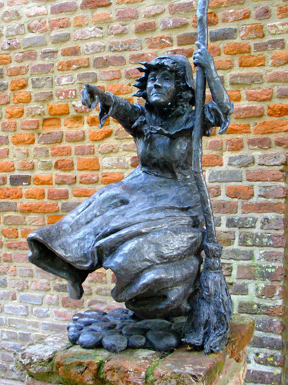 De heks van 's-Heerenberg (Mechteld ten Ham) beeld van Patrick Beverloo (het beeld werd eerste paasdag 2004 onthuld)